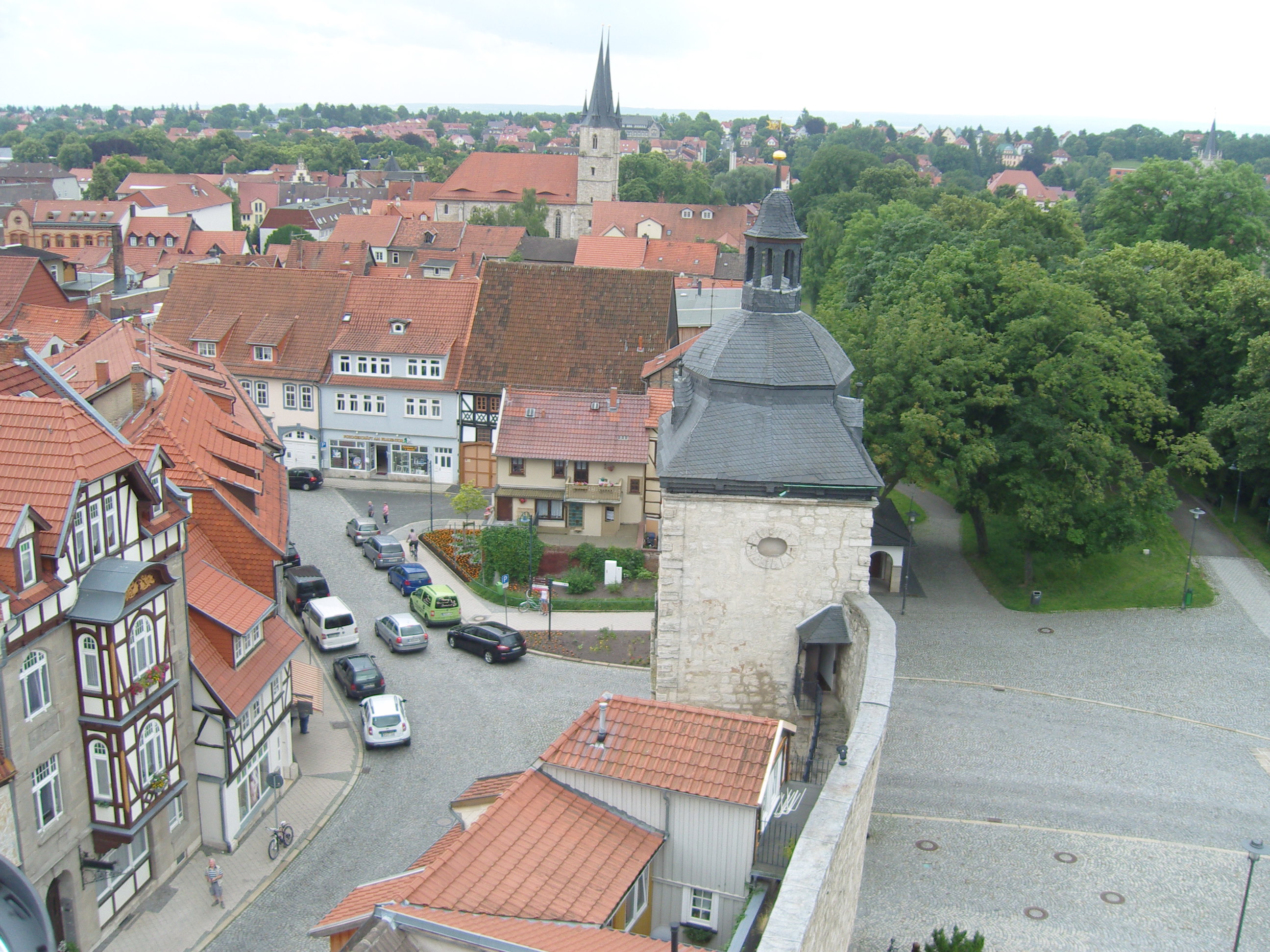 Stadtmauer Mühlhausen/Thüringen